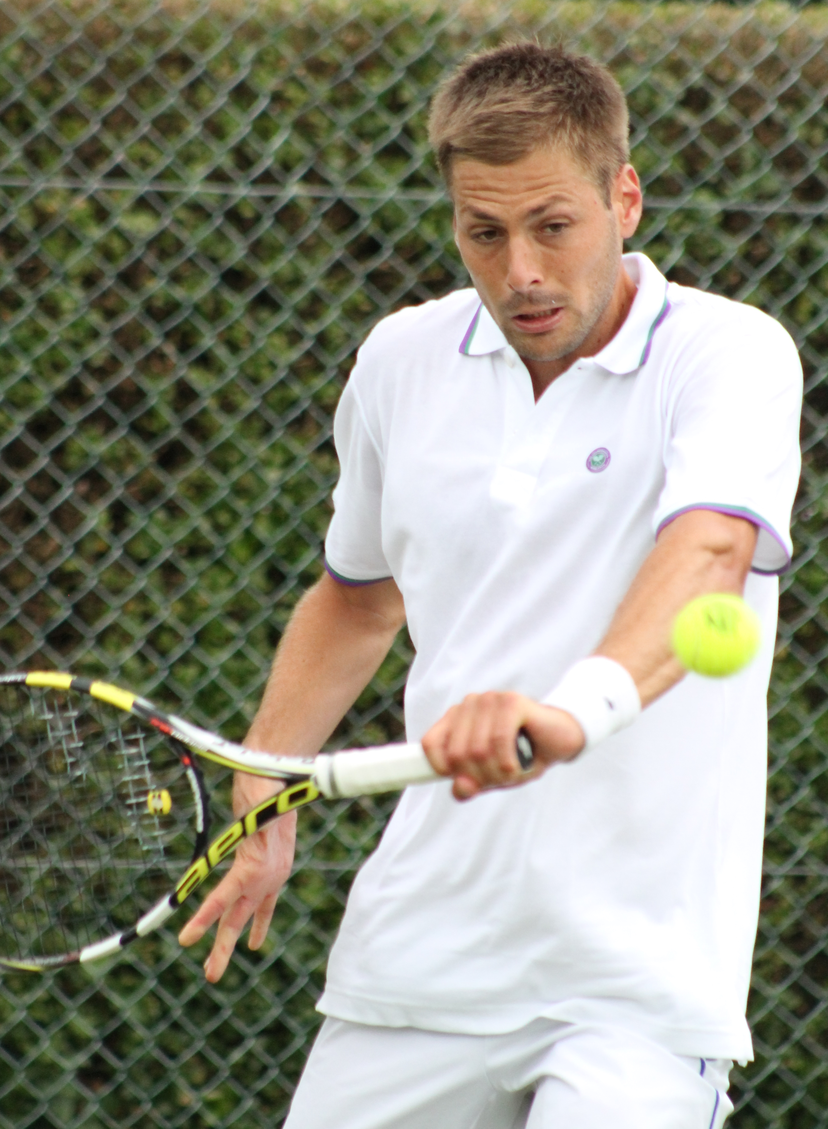 Burquier WMQ14 (8)